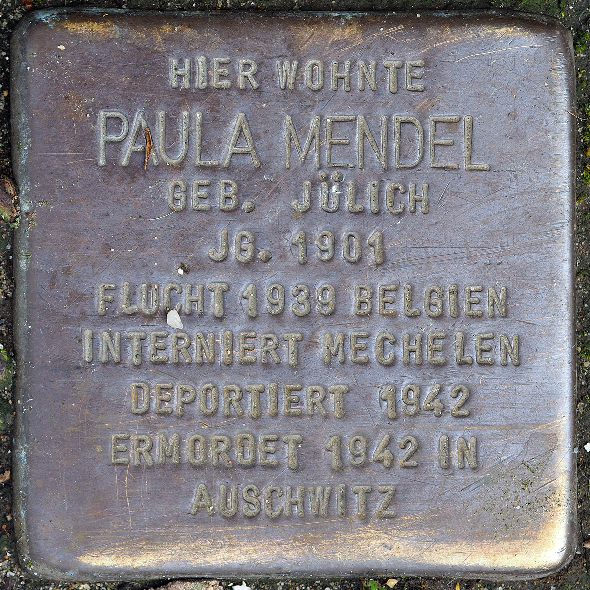 Stolpersteine MG: Mendel, Paula